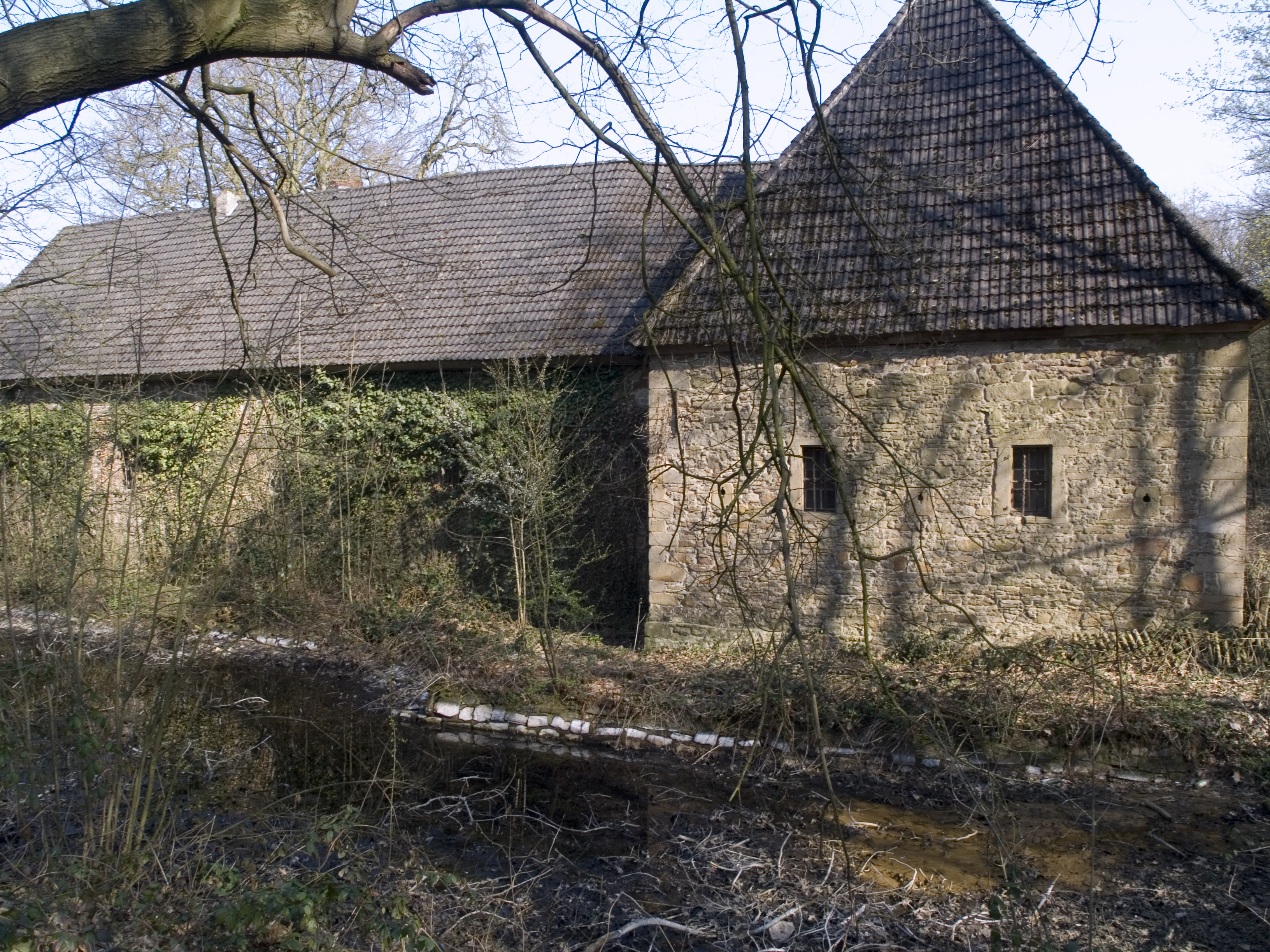 Северный Рейн - Вестфалия, Эссен, Кеттвиг - замок Гугенпот (внешний предзамок)